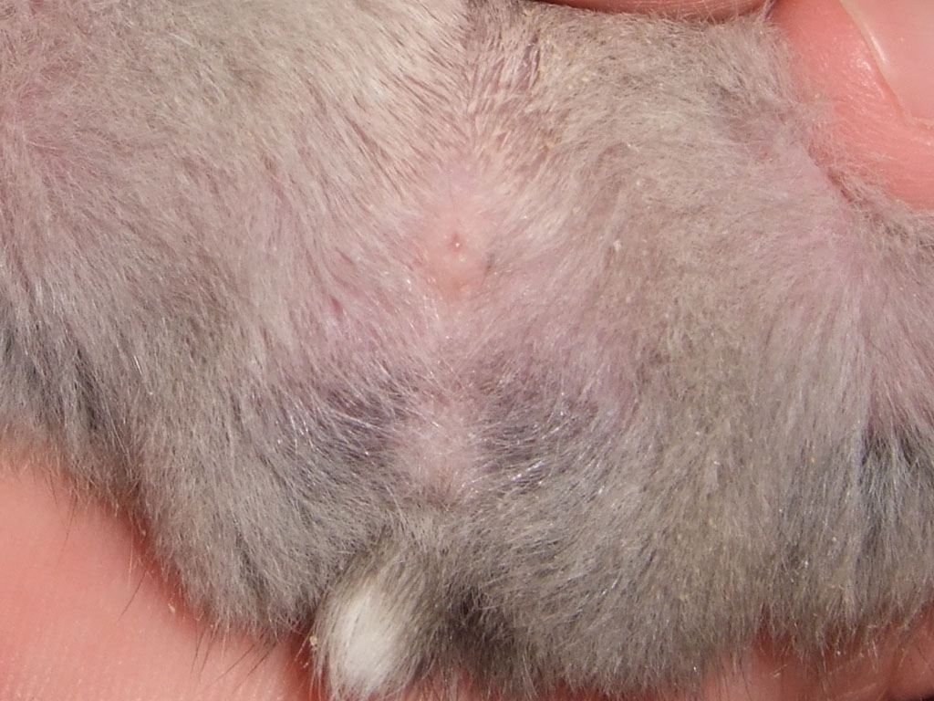 公坎貝爾侏儒倉鼠